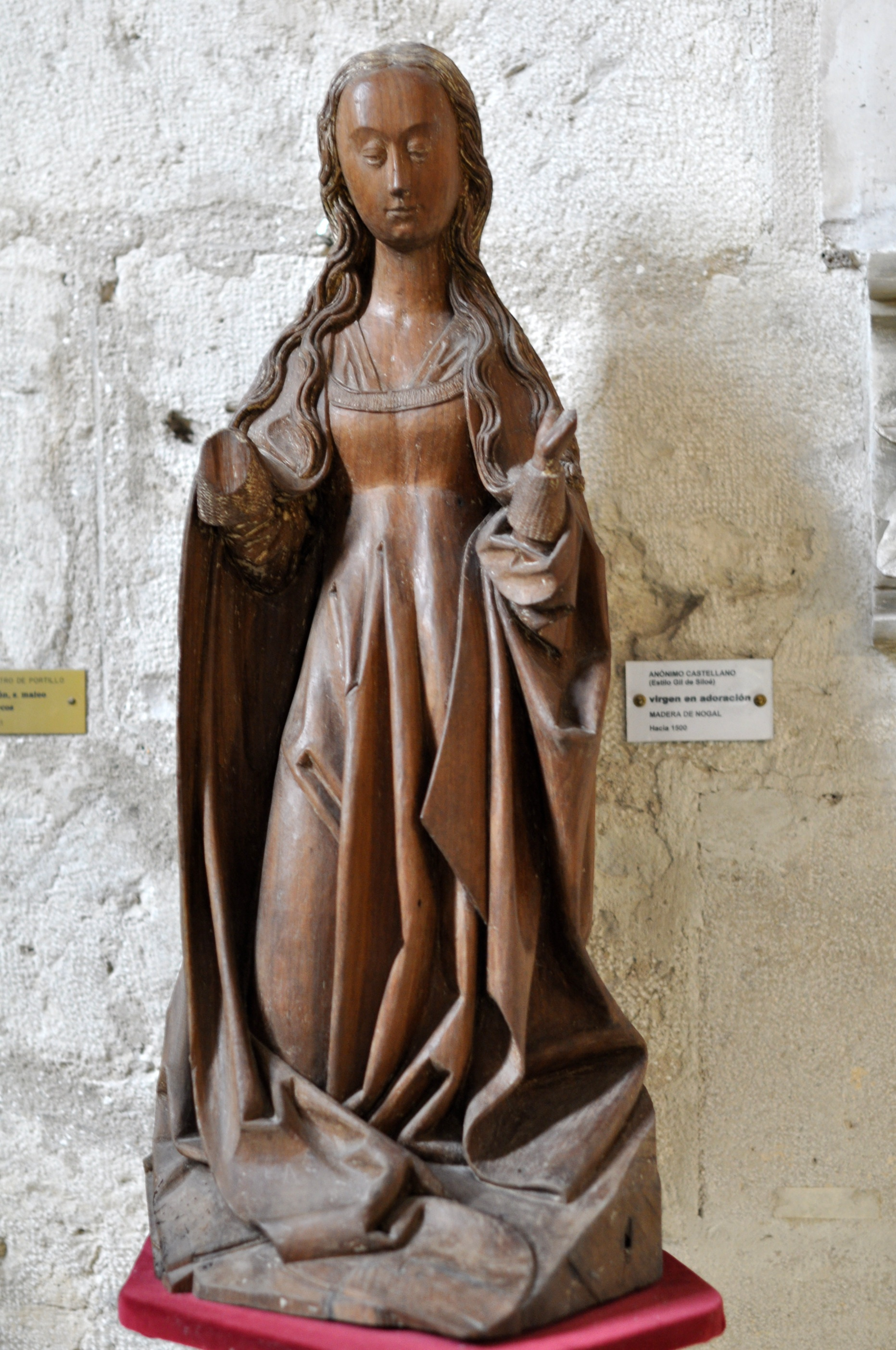 Virgen en Adoración. Atribuida a Gil de Siloe; debió figurar en el desaparecido retablo de la Capilla del Colegio de San Gregorio. Se expone en el museo diocesano de Valladolid.